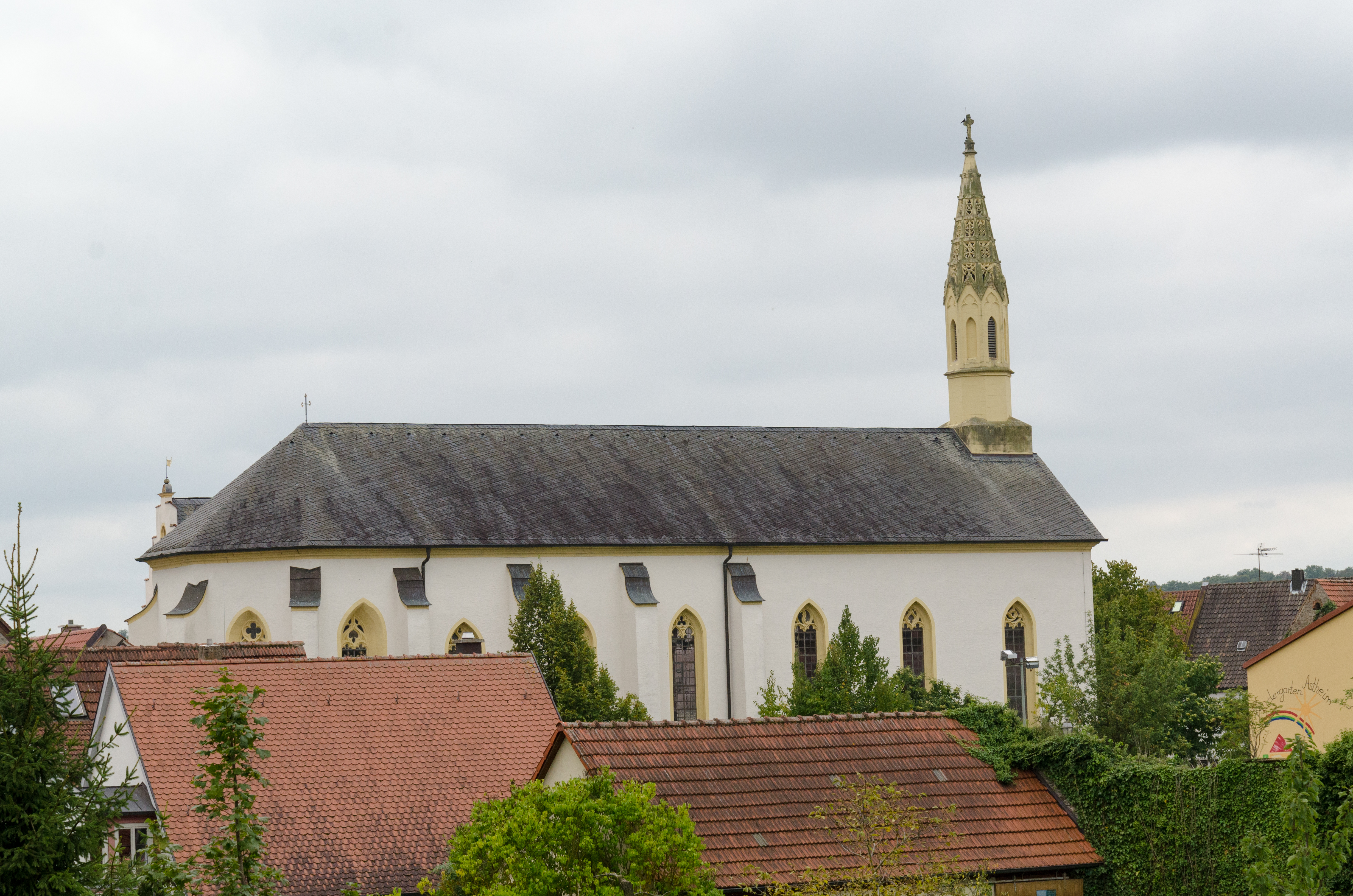 Volkach, Astheim, Brückenzollhaus